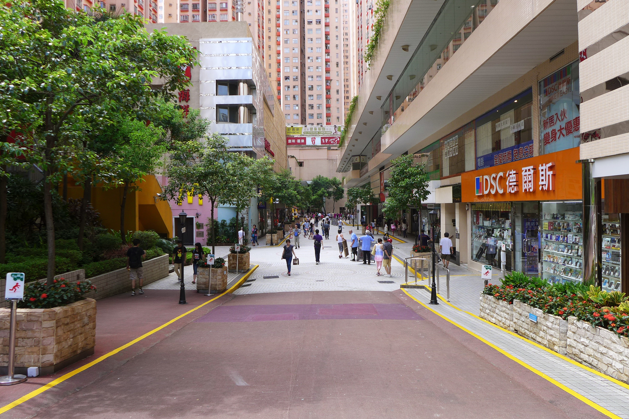 Amoy Plaza Delish